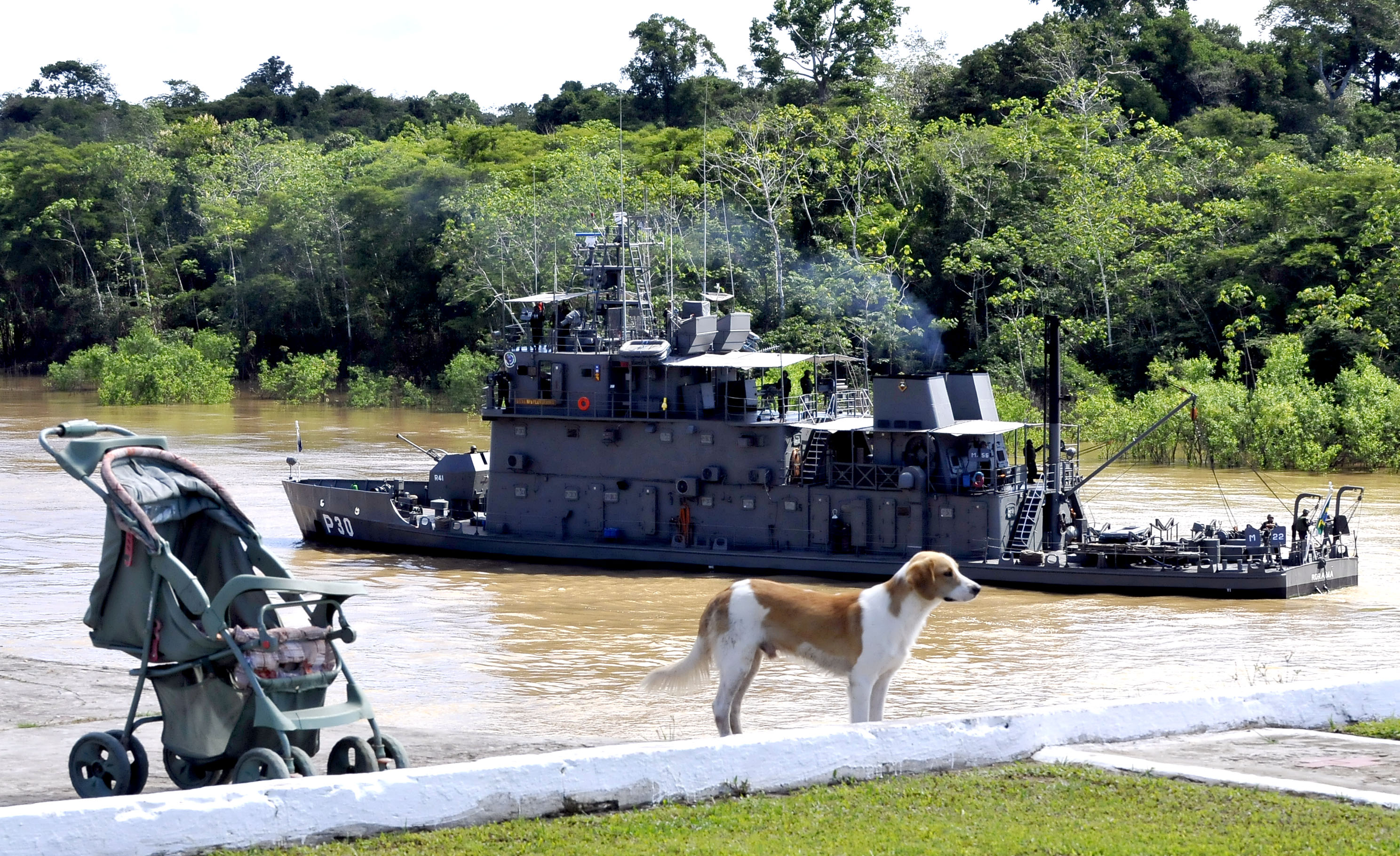 Foto: Jorge Cardoso